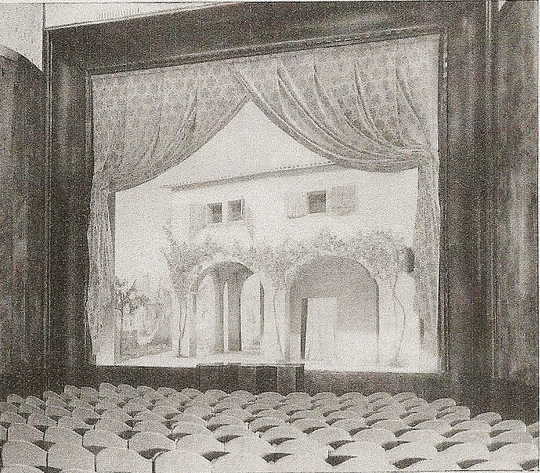 Hebbel-Theater Berlin; Bühnenansicht um 1908; Palisanderrahmen, Grauer Samtbrokat.